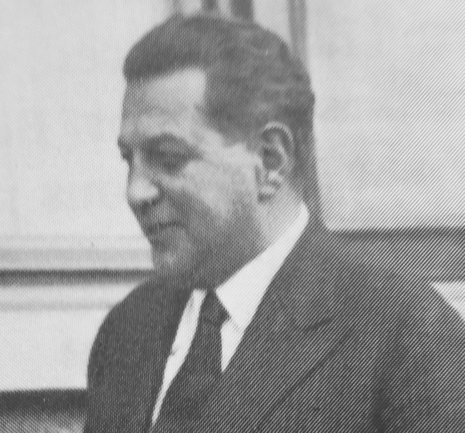 Ausschnitt eines Fotos von Paul Reno (Paul Pinkus Nothmann, 1887-1944) in den Paramount`s Joinville Studios neben Dita Parlo stehend. Vermutlich 1930